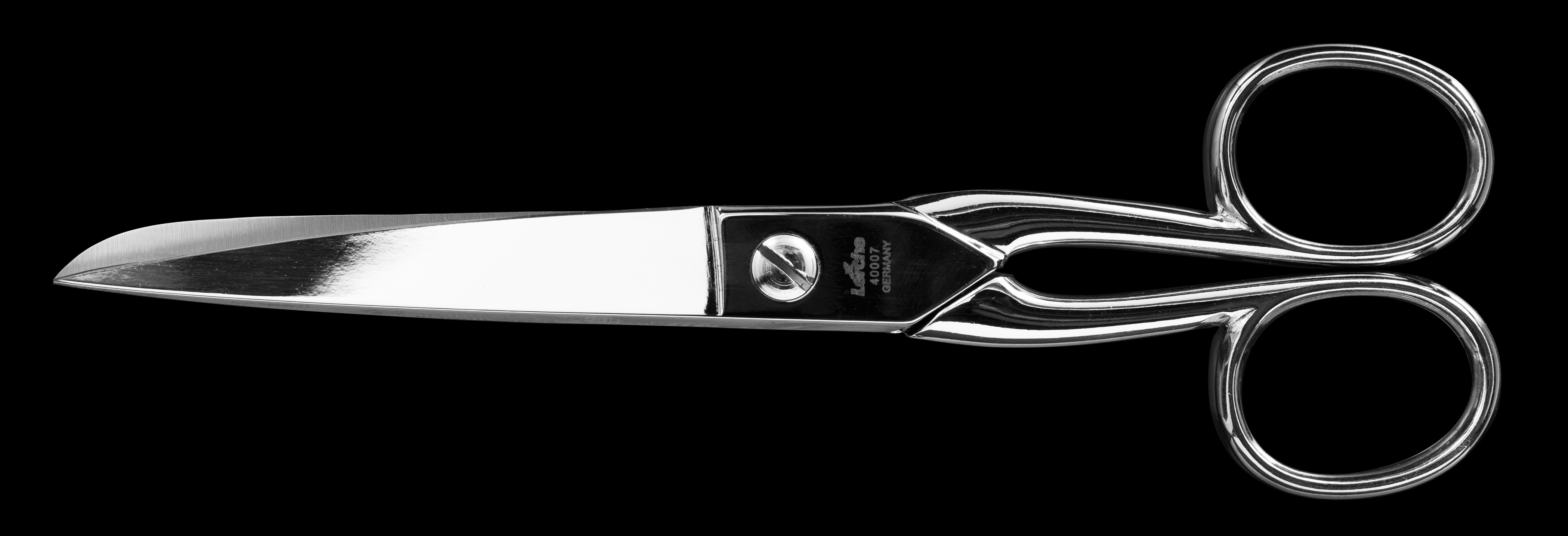 Lerche 4007 Büro- / Papierschere, verchromt.